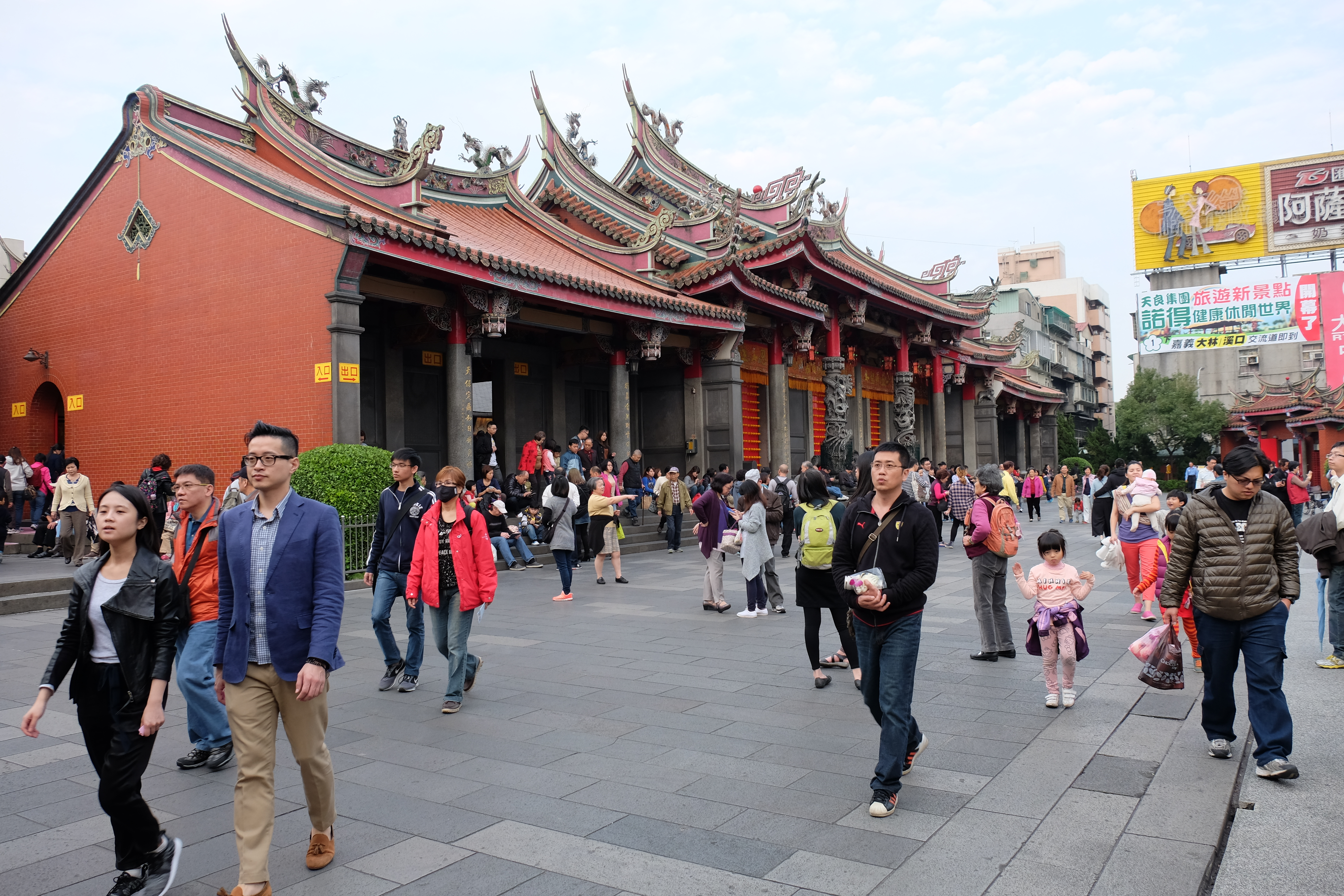 農曆大年初三下午，臺北市行天宮前庭往來絡繹不絕的參拜人潮。